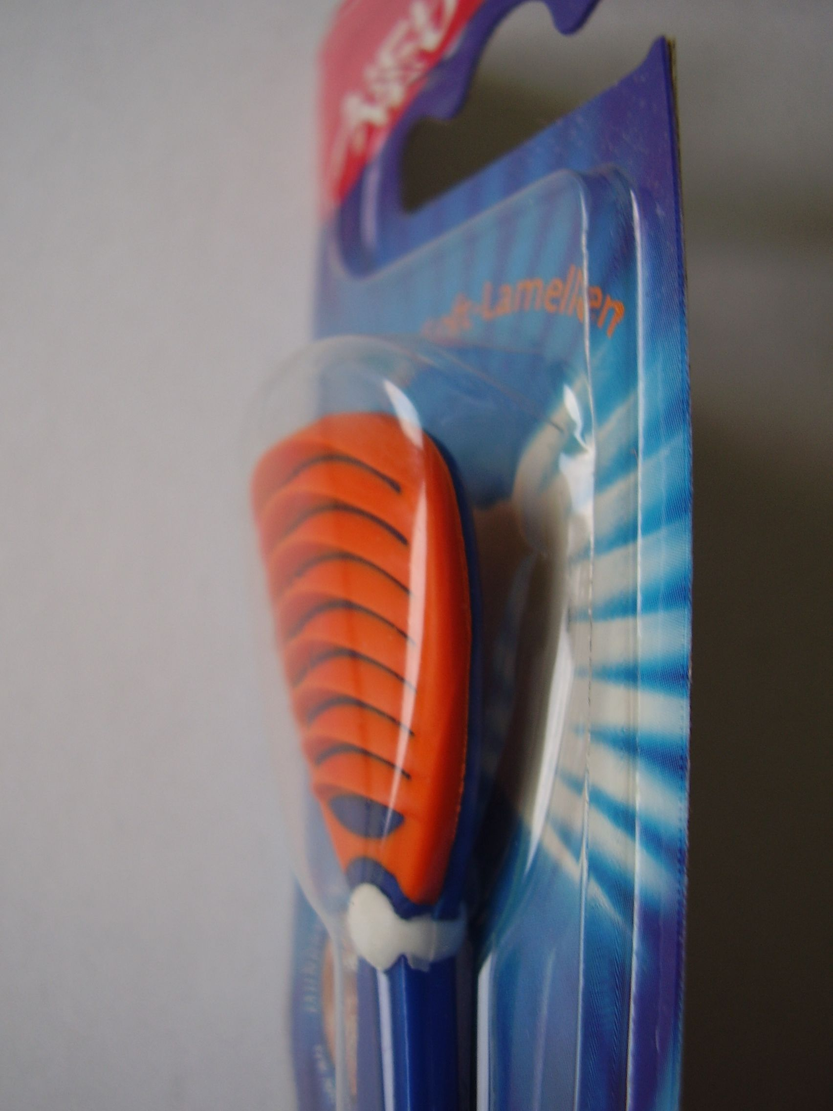 Zungenreiniger